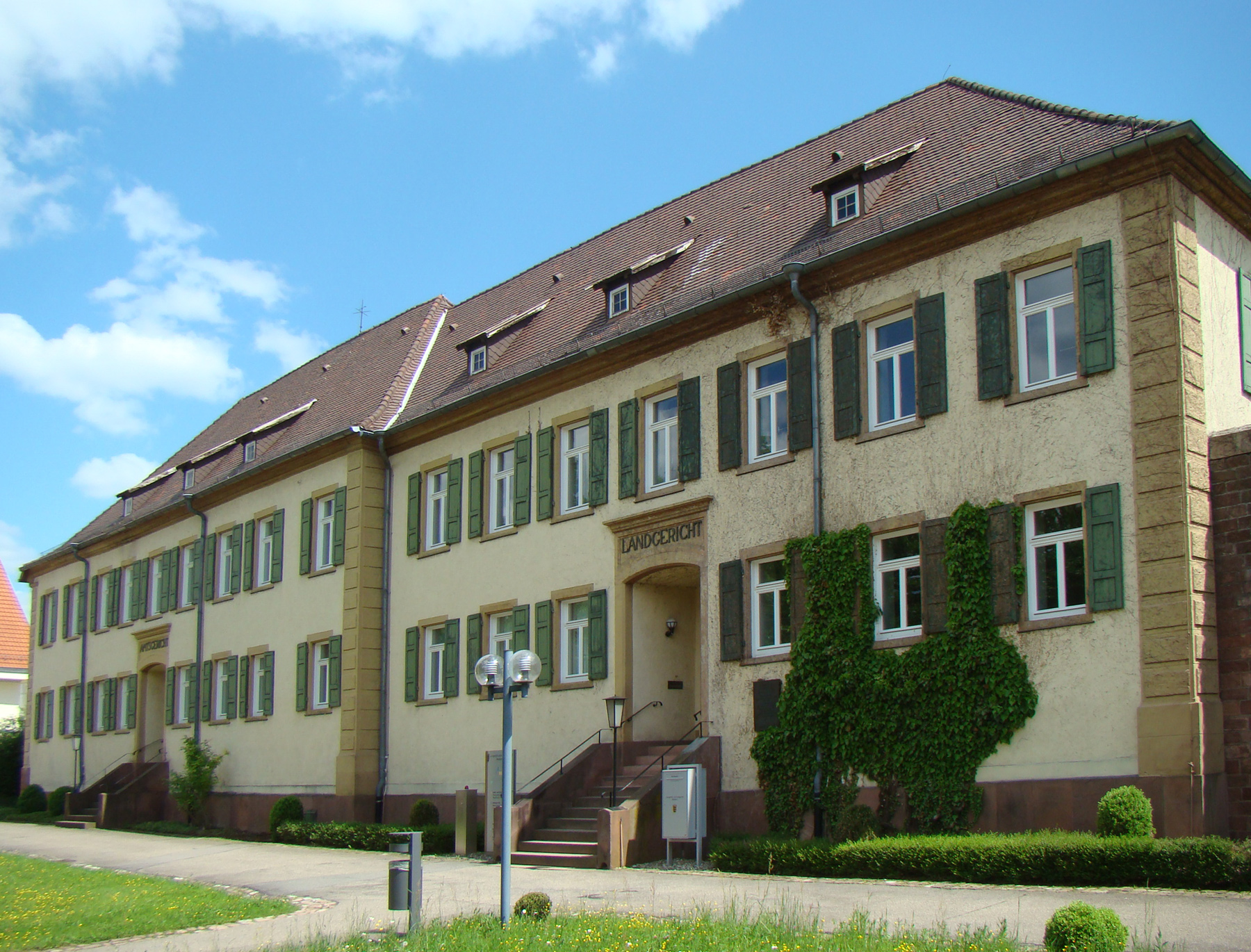 Franziskanerkloster Mosbach: Amts- und Landgerichtsgebäude, ehemaliger Klosterbau